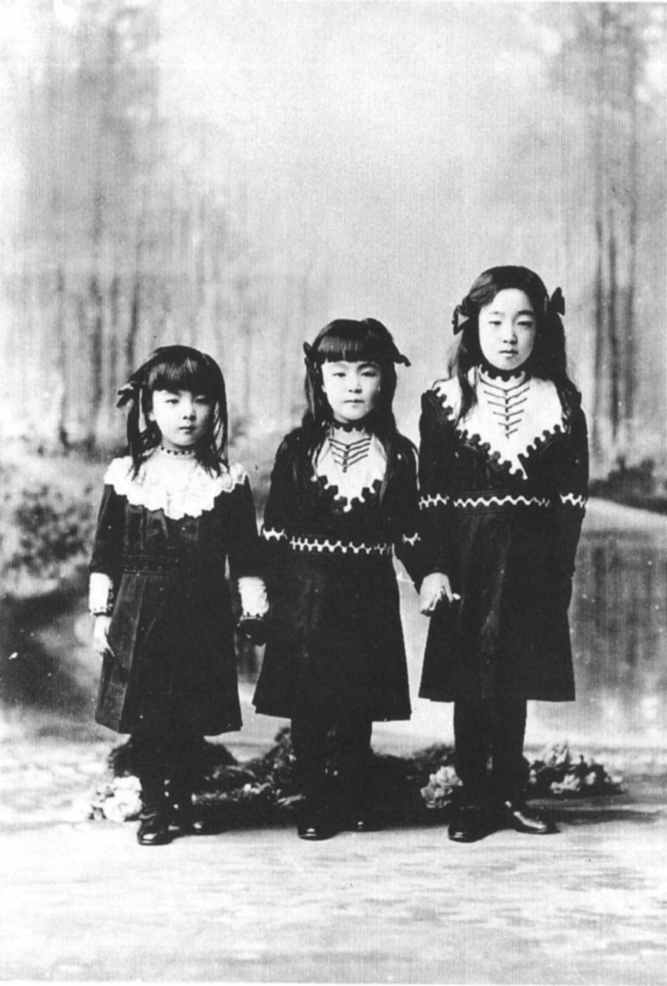 久邇宮家の三姉妹。左から、智子女王(Satoko)、信子女王(Nobuko)、良子女王(香淳皇后 Nagako/Empress Kōjun)